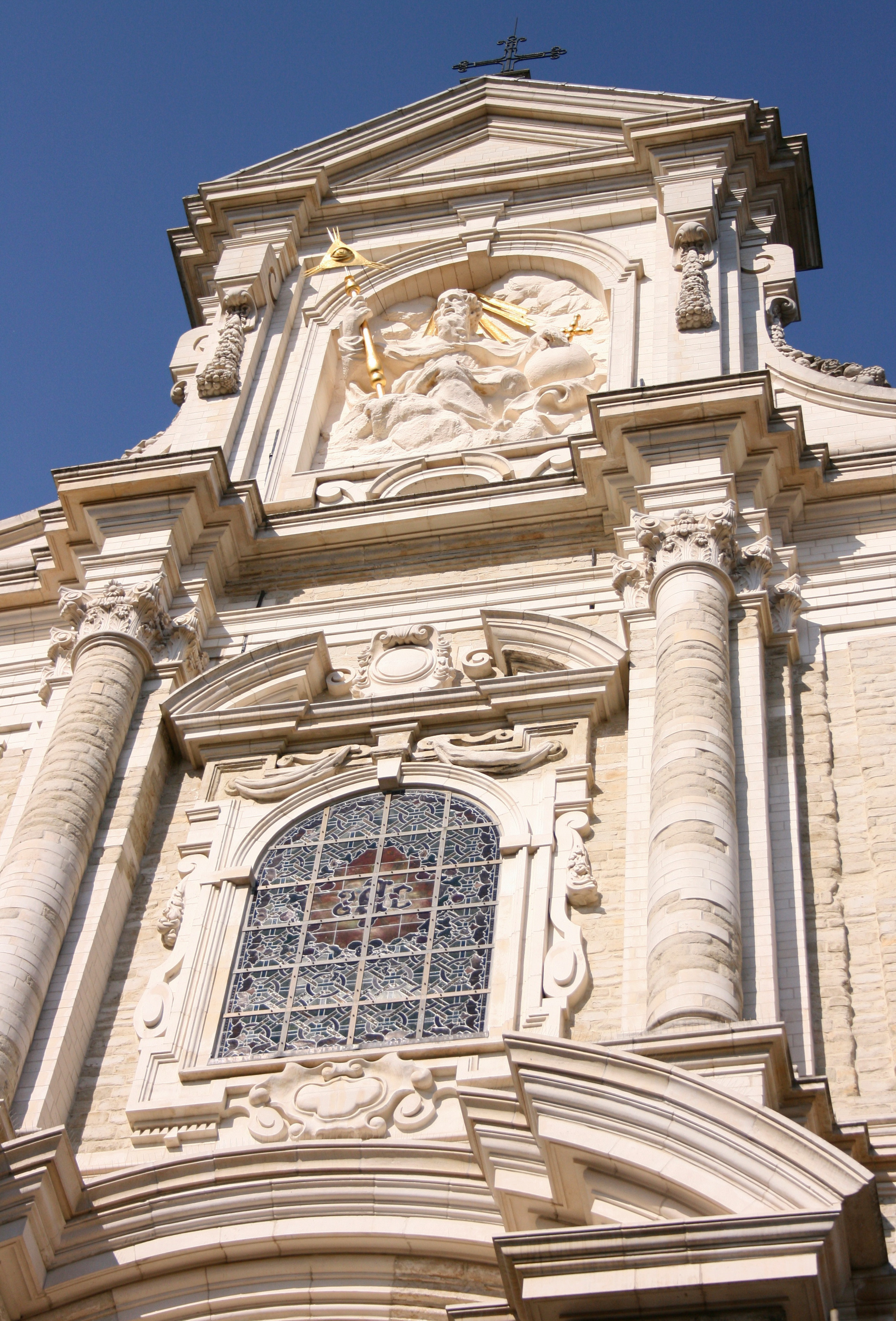 Groot Begijnhof, church (17th century), Nonnenstraat, Mechelen (Belgium)